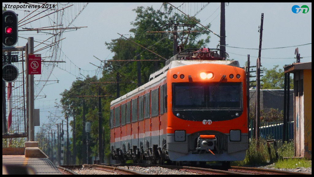 UT-440 dirección San Fernando. Rancagua.